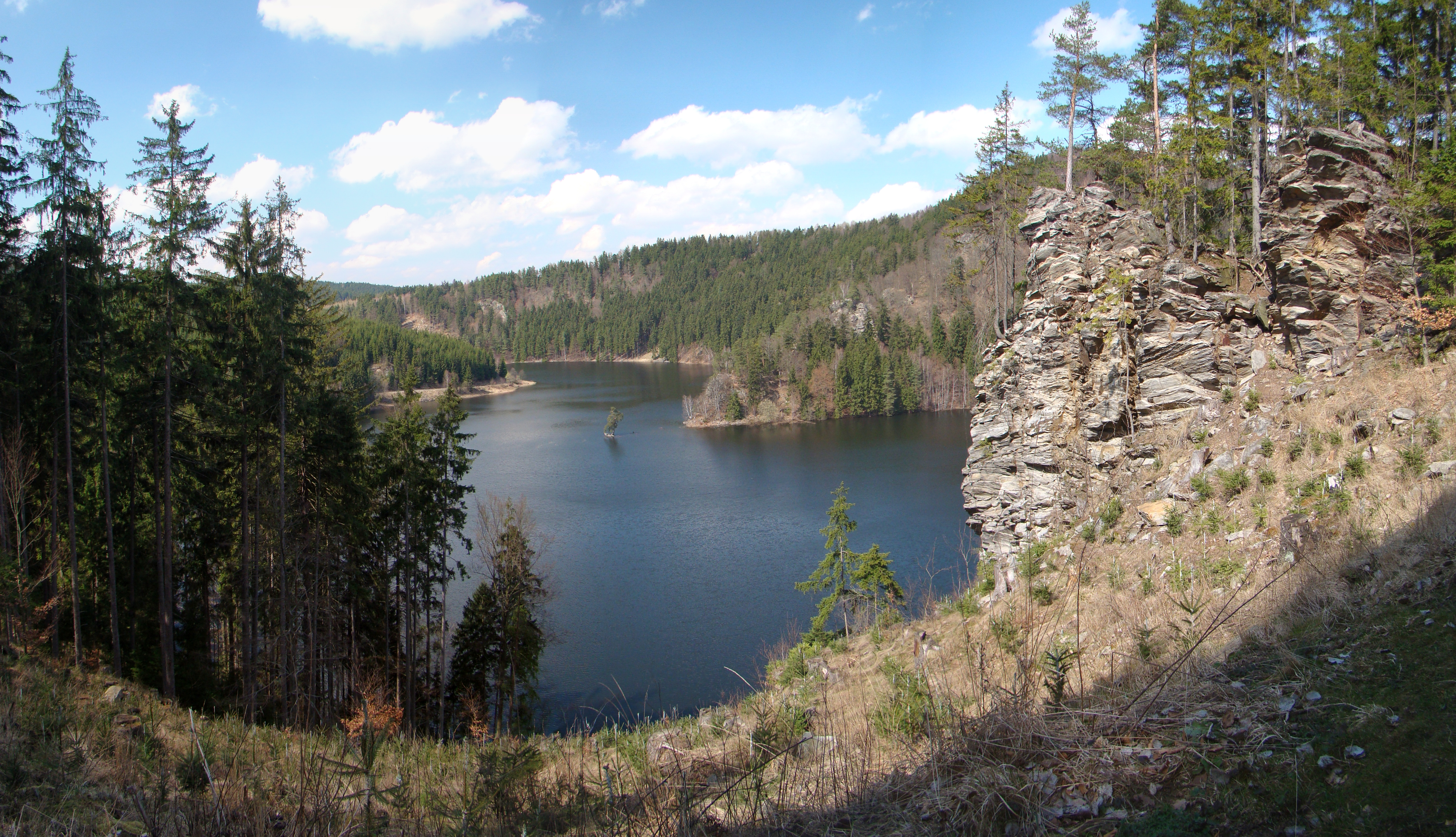 The Chudobin scotch pine during maximum water level in the Vír reservoir